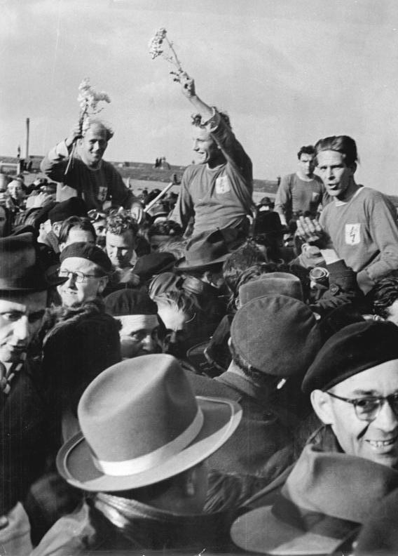 Zentralbild-TBD-Wlocka-Kister Wjt-Ku. 4 Motive 25.4.1955 -2930- SC Turbine Erfurt Fußballmeister - DDR-Fußballmeister 1954-55 wurde zum zweiten Male hintereinander der Sportclub Turbine Erfurt. In 25 Spielen ungeschlagen lagen die Erfurter stets an der Spitze der Tabelle, holten sich die Meisterwürde jedoch nur mit einem Punkt Vorsprung vor dem SC Wismut Karl-Marx-Stadt. Spiel SC Turbine Erfurt - SC Lok Leipzig im Leipziger Stadion des Friedens. Nach dem 1:1 beim Abpfiff stürmten tausende der Zuschauer auf den Platz. Die Erfurter Schlachtenbummler trugen die neuen DDR-Meister auf den Schultern vom Platz. (Von links nach rechts): Julo Hannel, Lothar Weise, Georg Rosbigalle und Kimme Hoffmeyer.